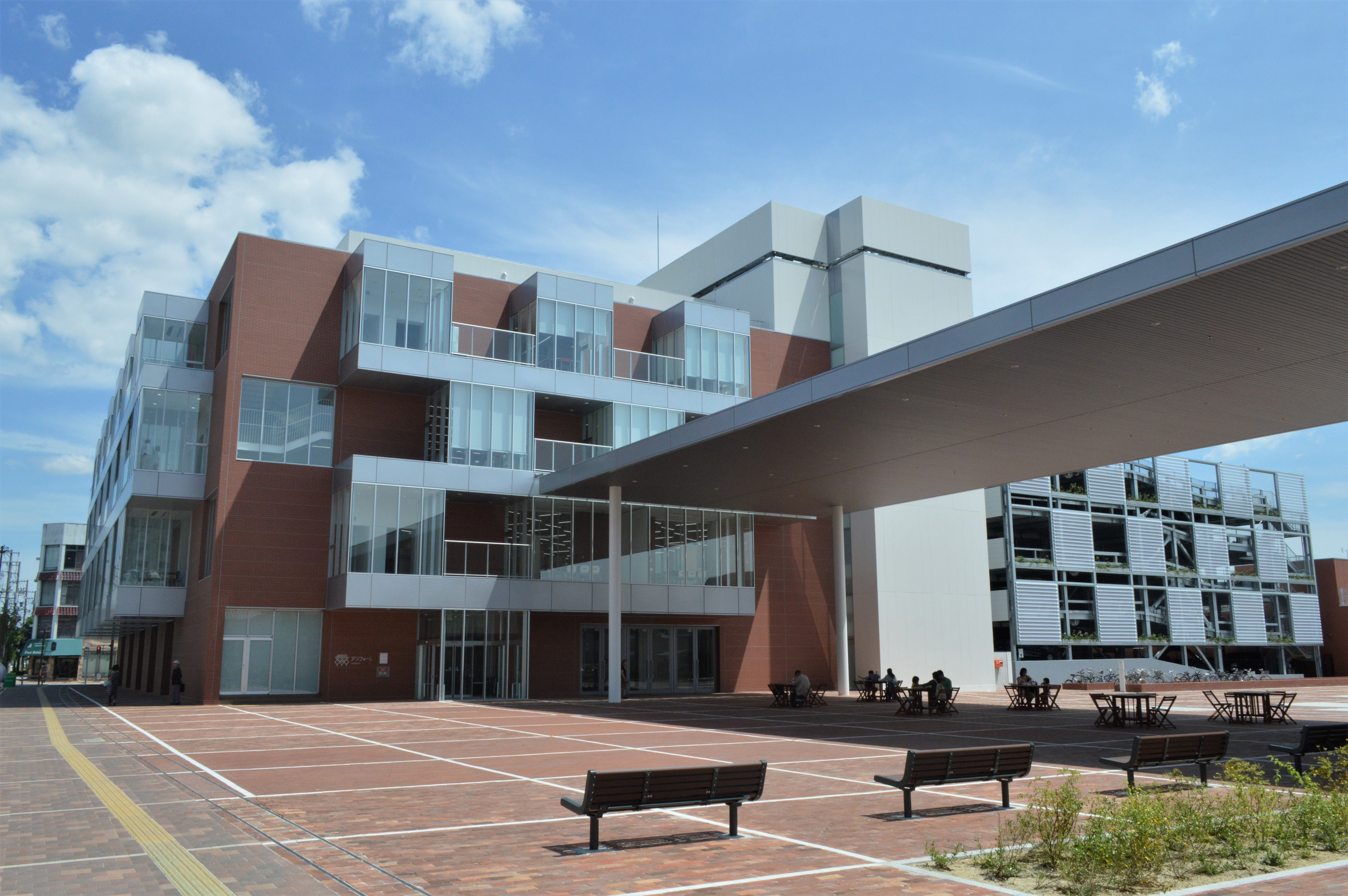 安城市のアンフォーレ本館。安城市図書情報館などが入っている。